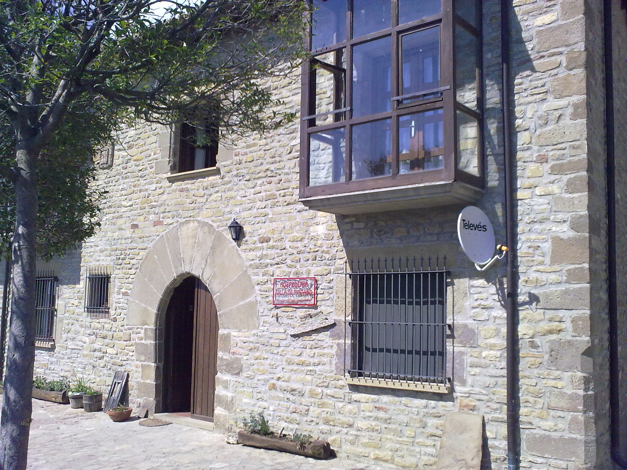 Pintano le 23 mai 2010.